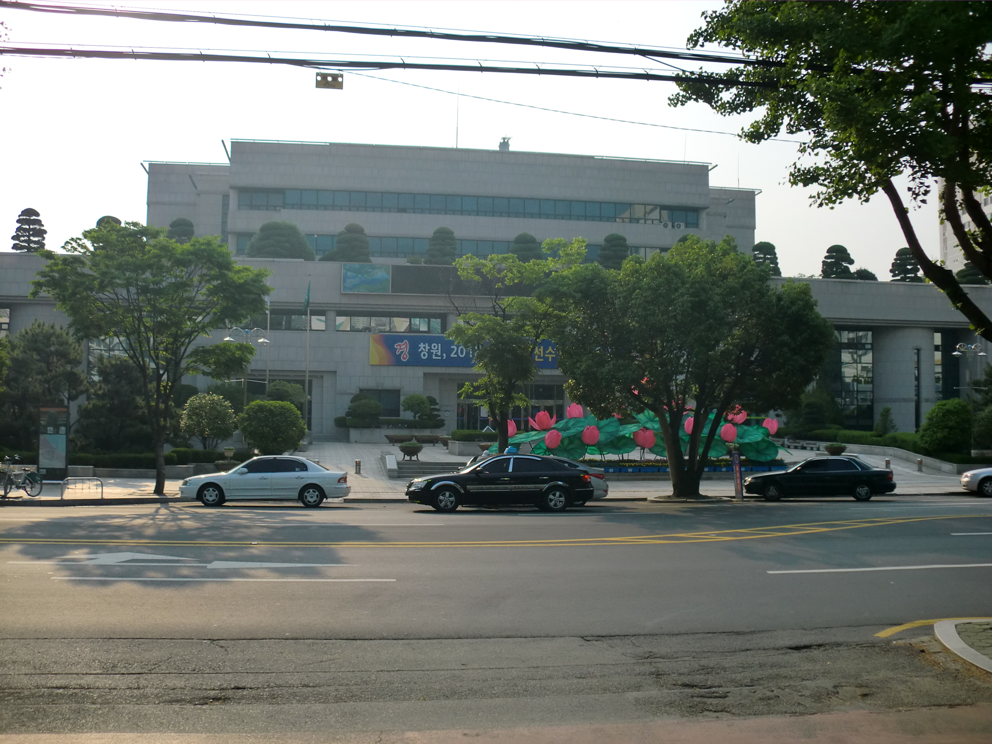 경상남도 창원시 마산합포구에 있는 마산합포구청